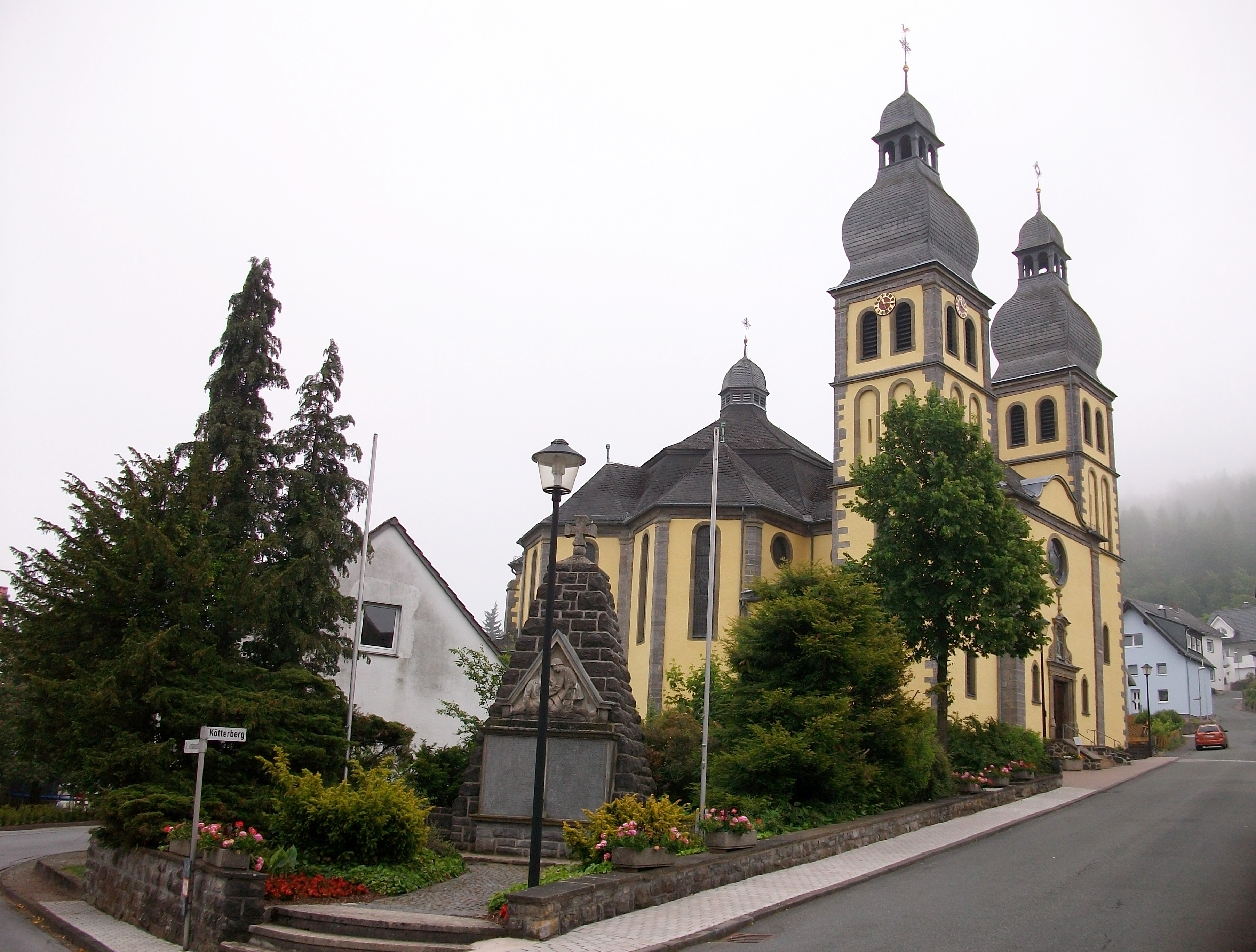 St. Maria Magdalena, denkmalgeschützte Kirche in Marsberg-Padberg (Germany)